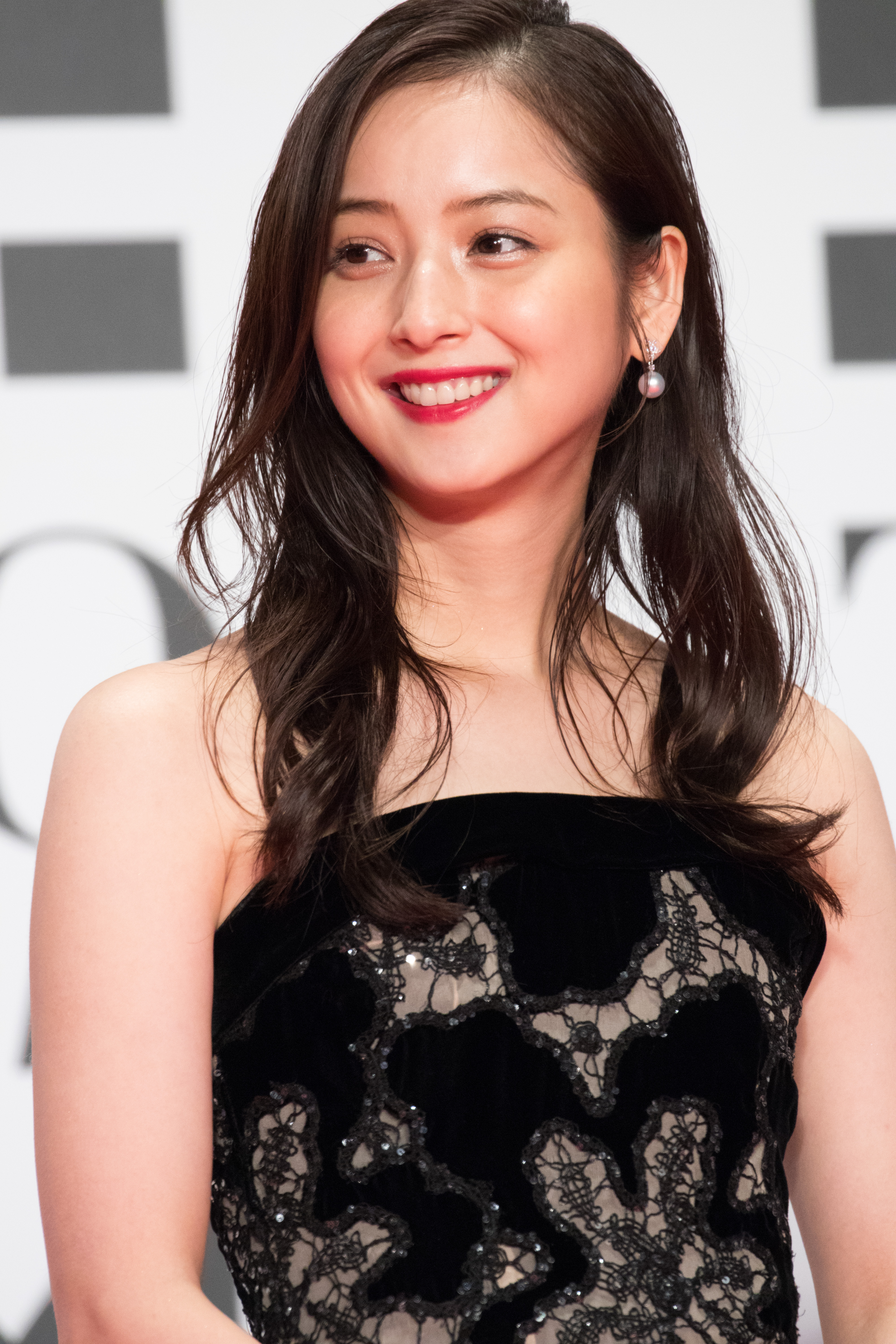 第29回 東京国際映画祭 オープニングセレモニー 佐々木希 (いきなり先生になったボクが彼女に恋をした)